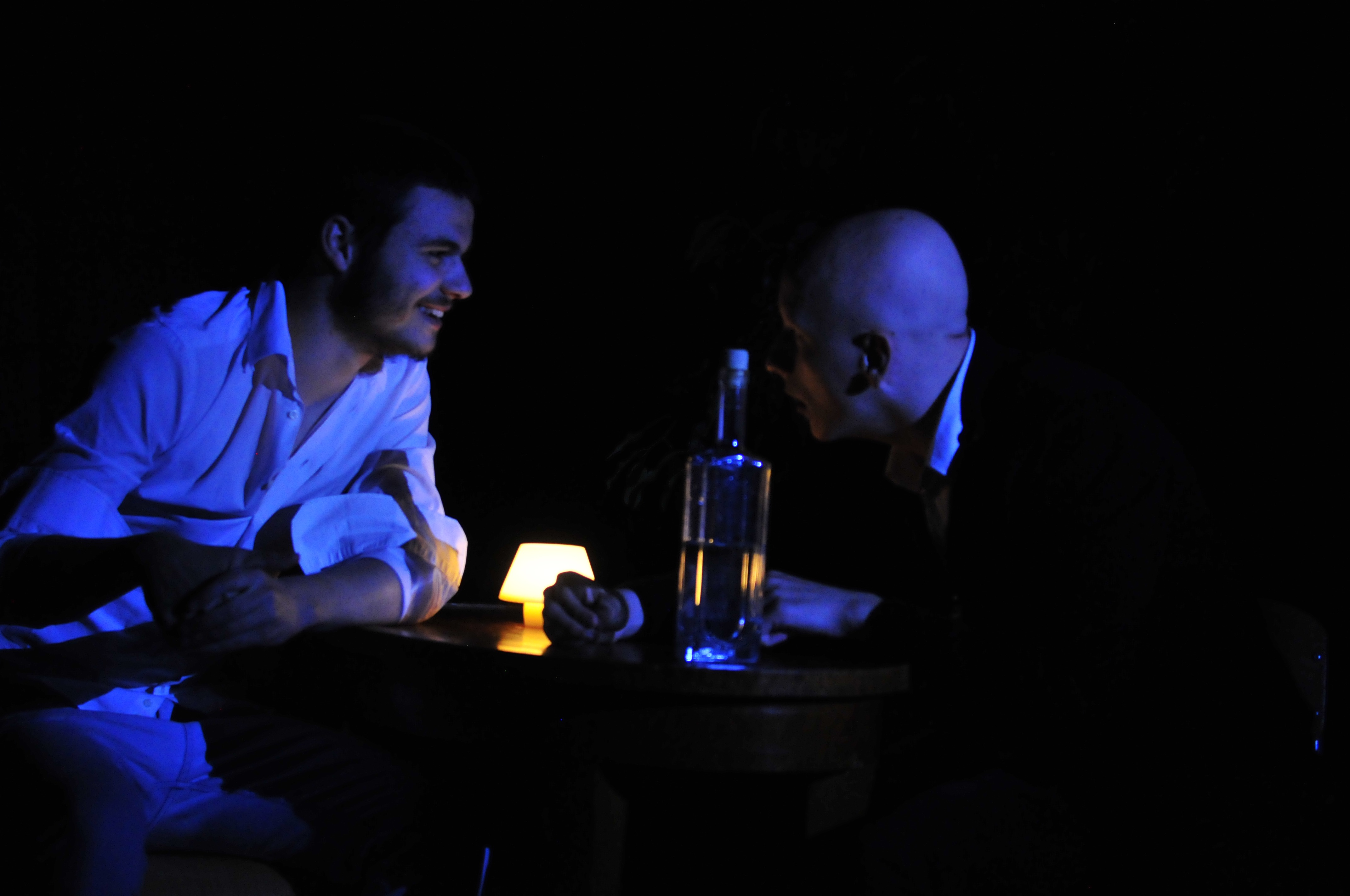 Traži se novi suprug